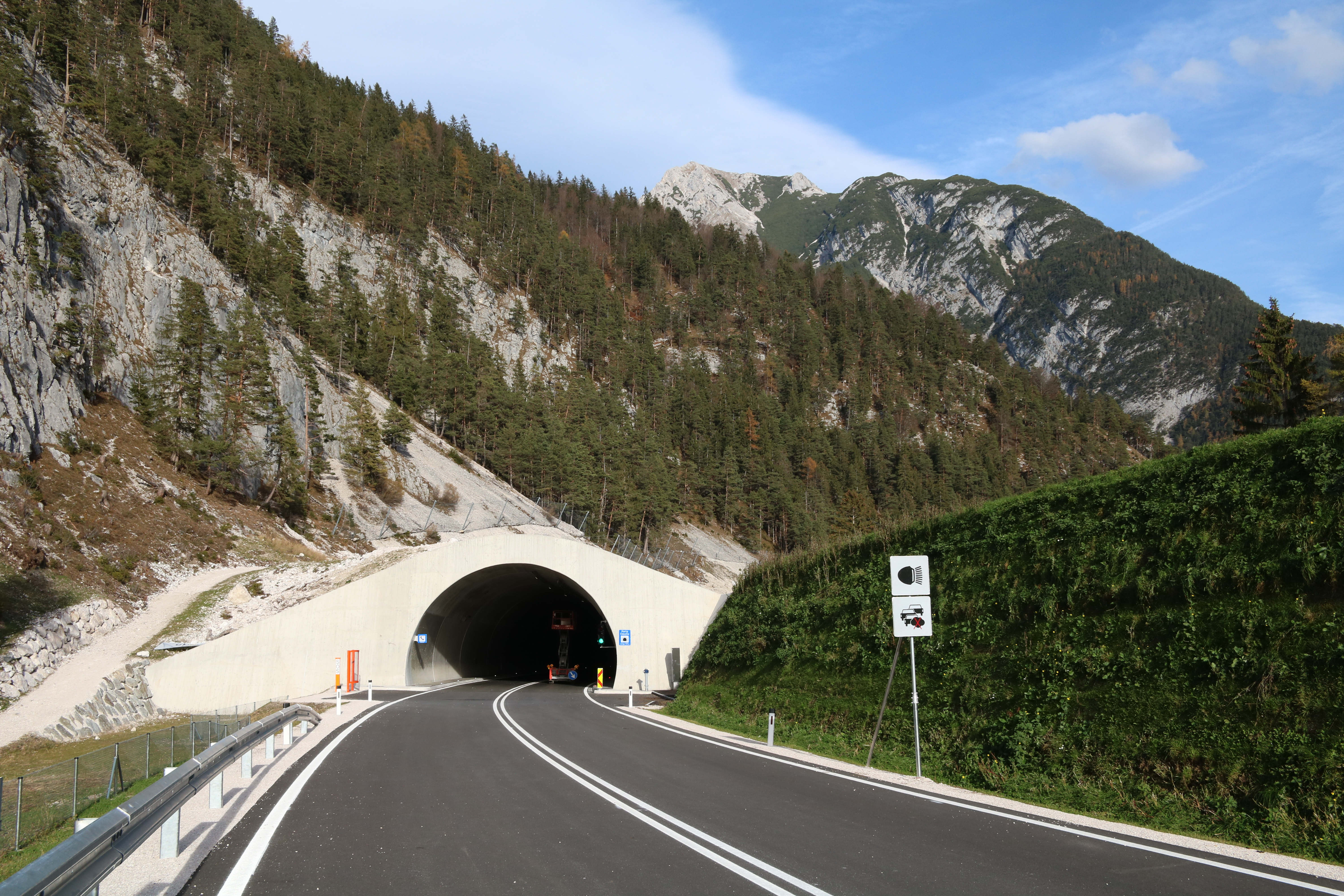 Das Südportal des Porta Claudia Tunnels der Umfahrung Scharnitz